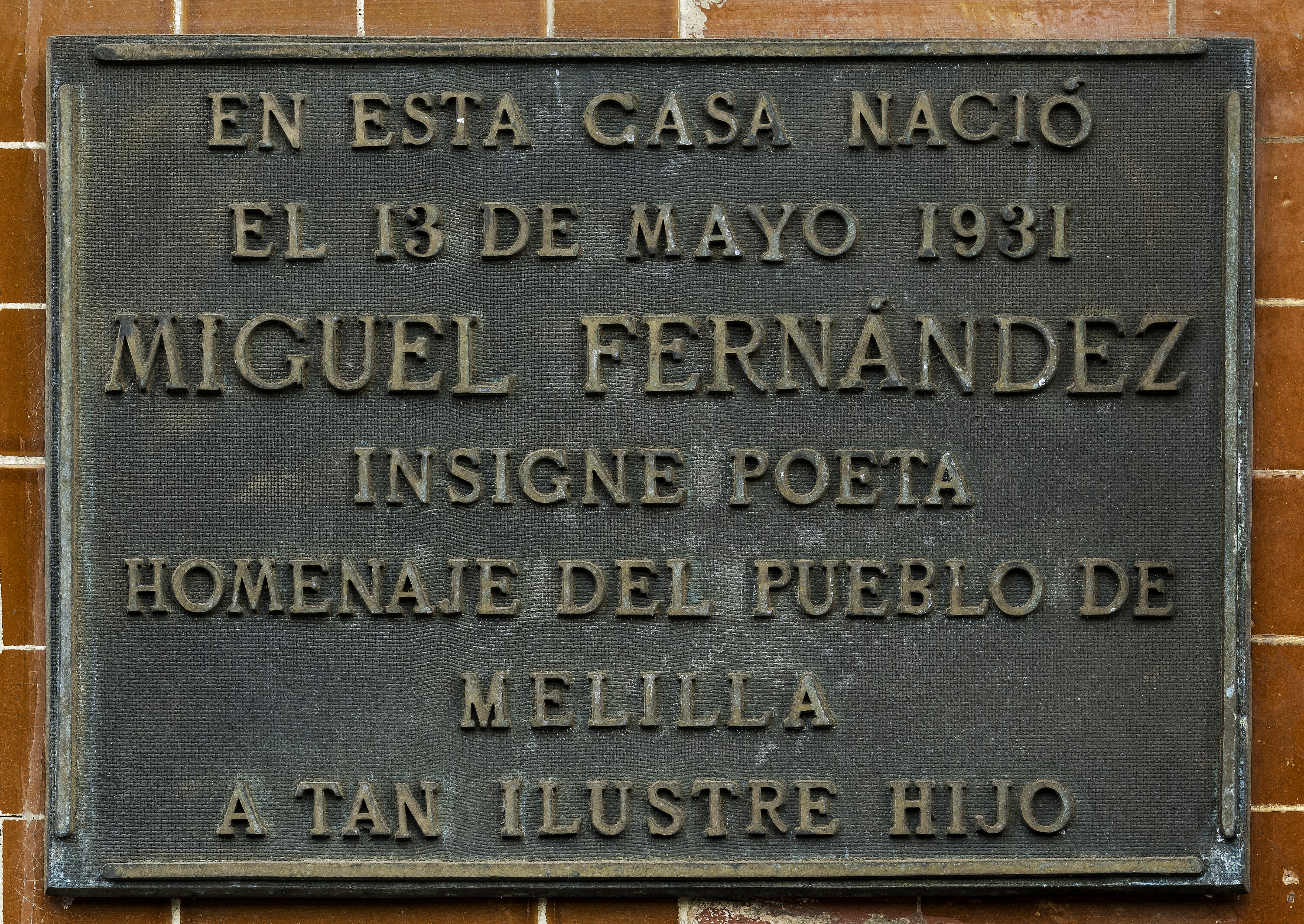 Placa homenaje al poeta melillense premio nacional de literatura Miguel Fernández. Ubicada en edificio modernista Casa Eulalia Vides.